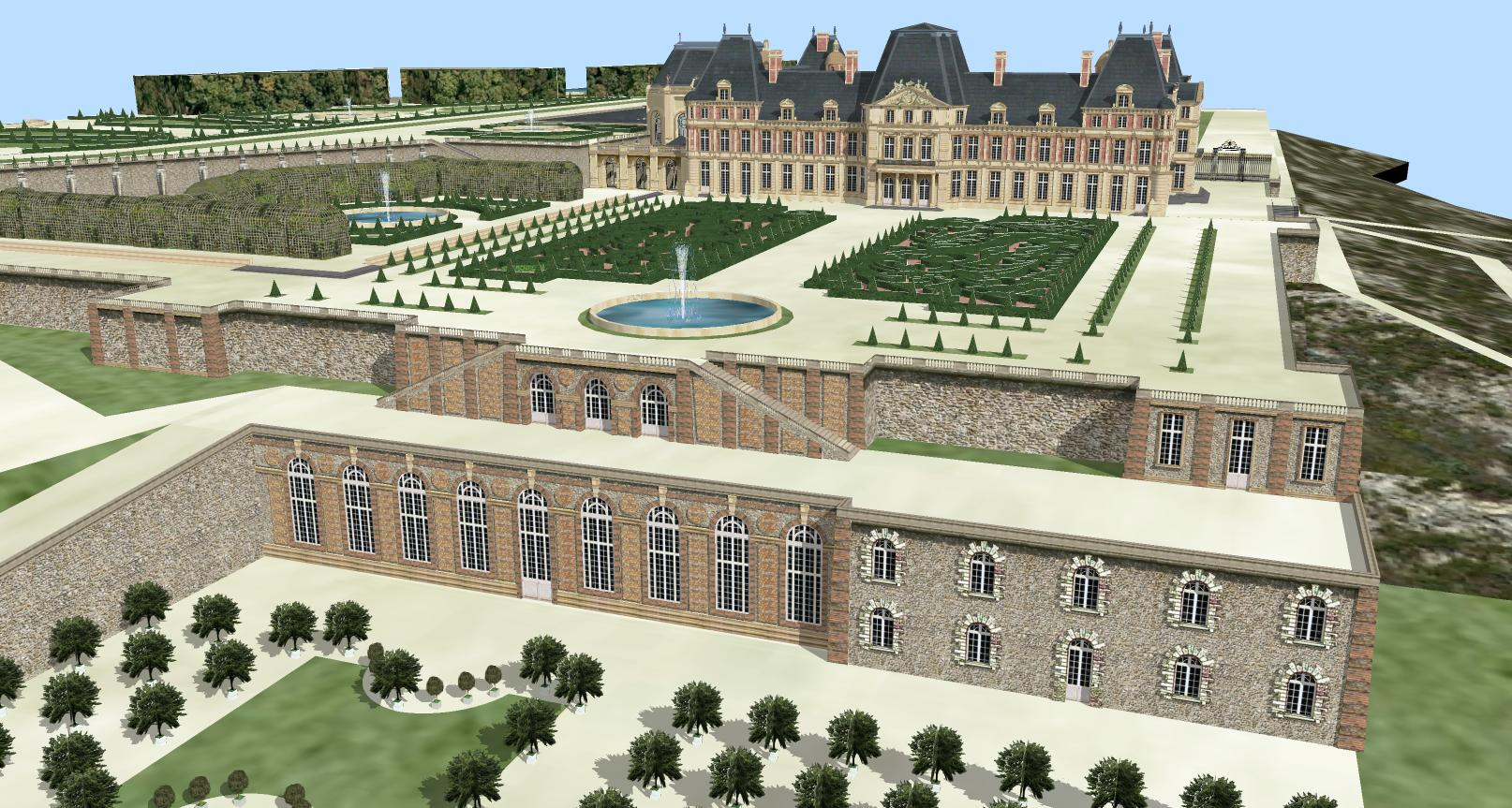 Description Restitution virtuelle du Château-Vieux de Meudon. DateWinter 2011.SourceFranck Devedjian & Hervé Grégoire. devedjian Restitution virtuelle du Château-Vieux de Meudon.